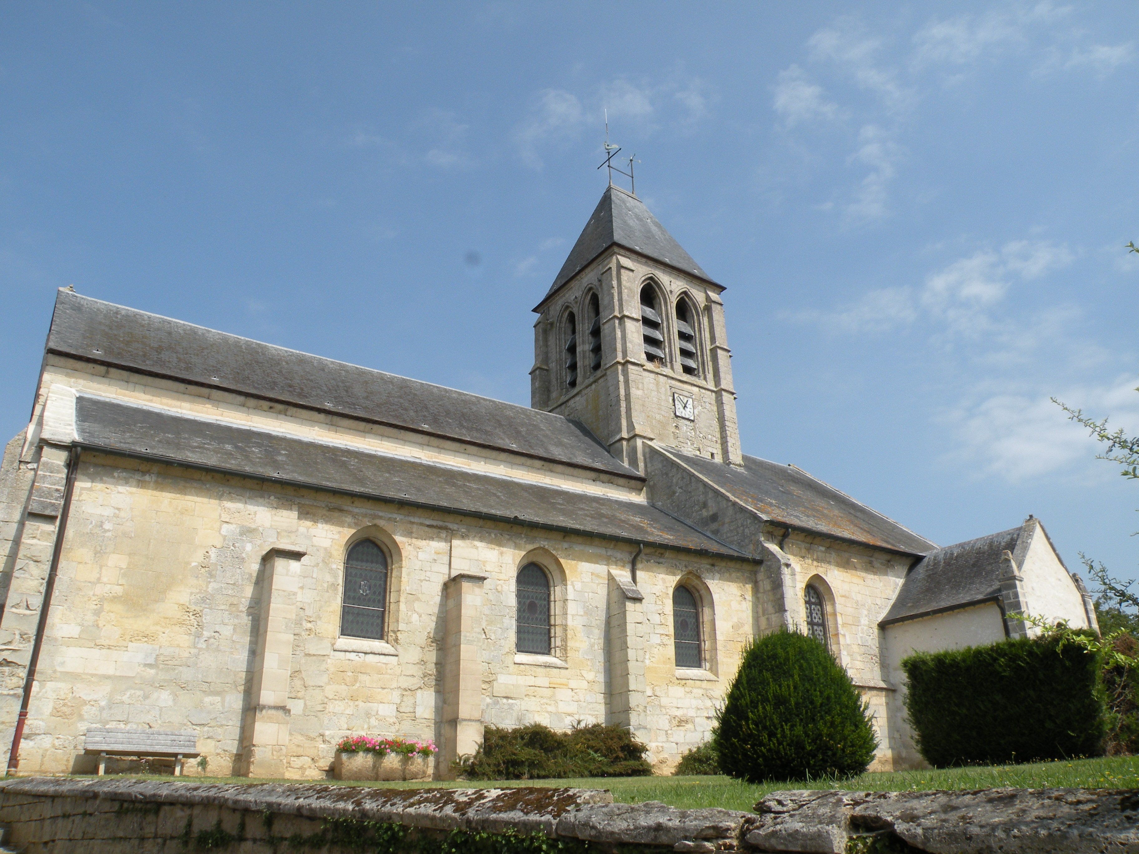 eglise d'arronville, val d'oise, france